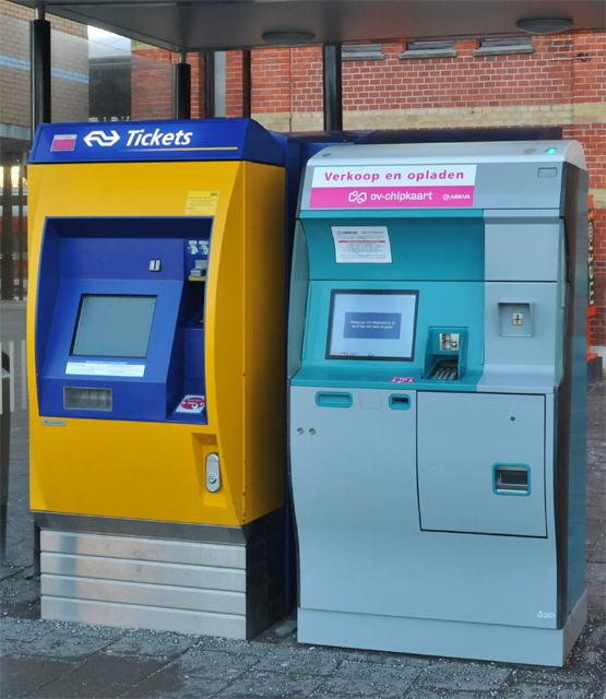 De NS kaartautomaat en de net geactiveerde Arriva kaartautomaat op 6 januari 2011 te Groningen